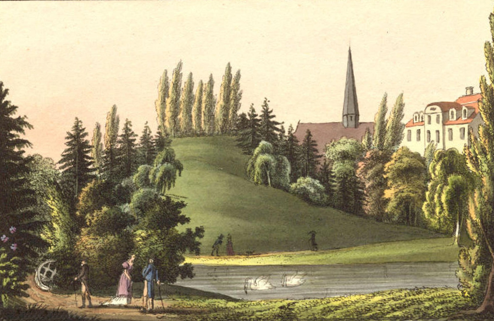 Der Schneckenberg in den Englischen Anlagen in Leipzig um 1830